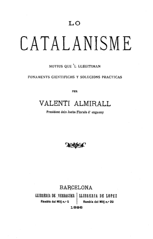 ALMIRALL, Valentí. Lo catalanisme. Motius que 'l llegitiman. Fonaments cientifichs y solucions practicas. Barcelona: Llibreria de Verdaguer - Llibreria de Lopez, 1886.